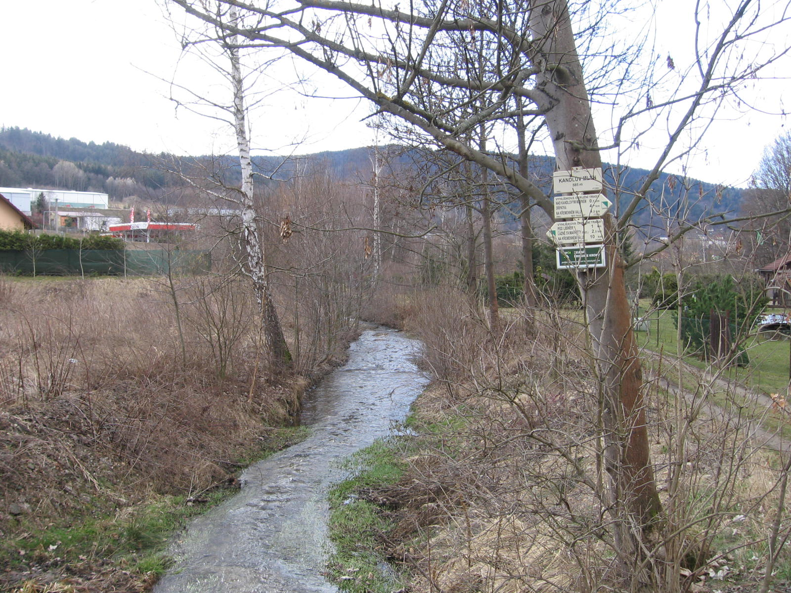 Kandlův mlýn u Prachatic a jeho okolí, rekreační středisko v bývalém mlýně pod Libínem